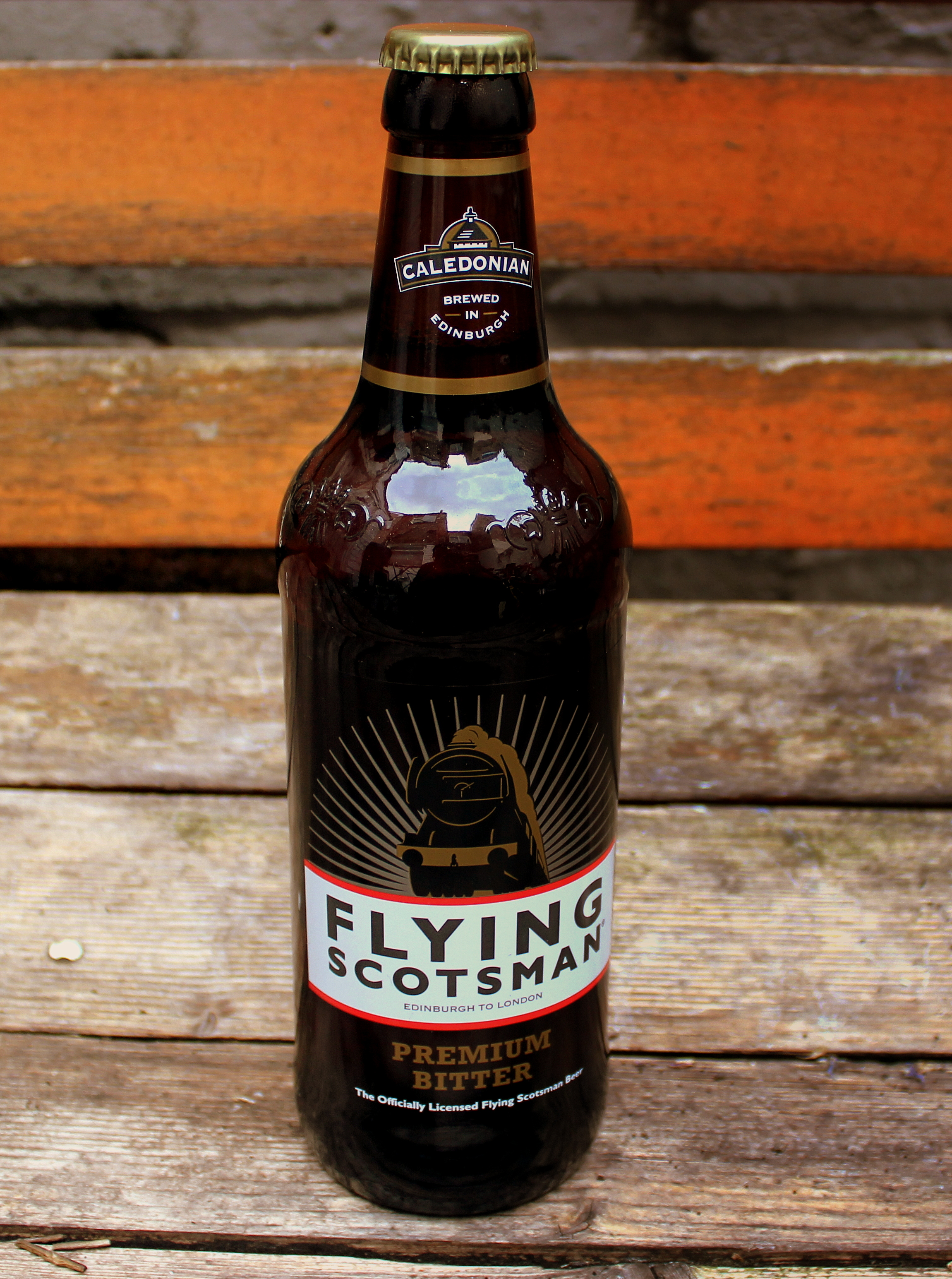 FLYING SCOTSMAN PREMIUM BITTER BY THE CALEDONIAN BREWERY JULY 2013